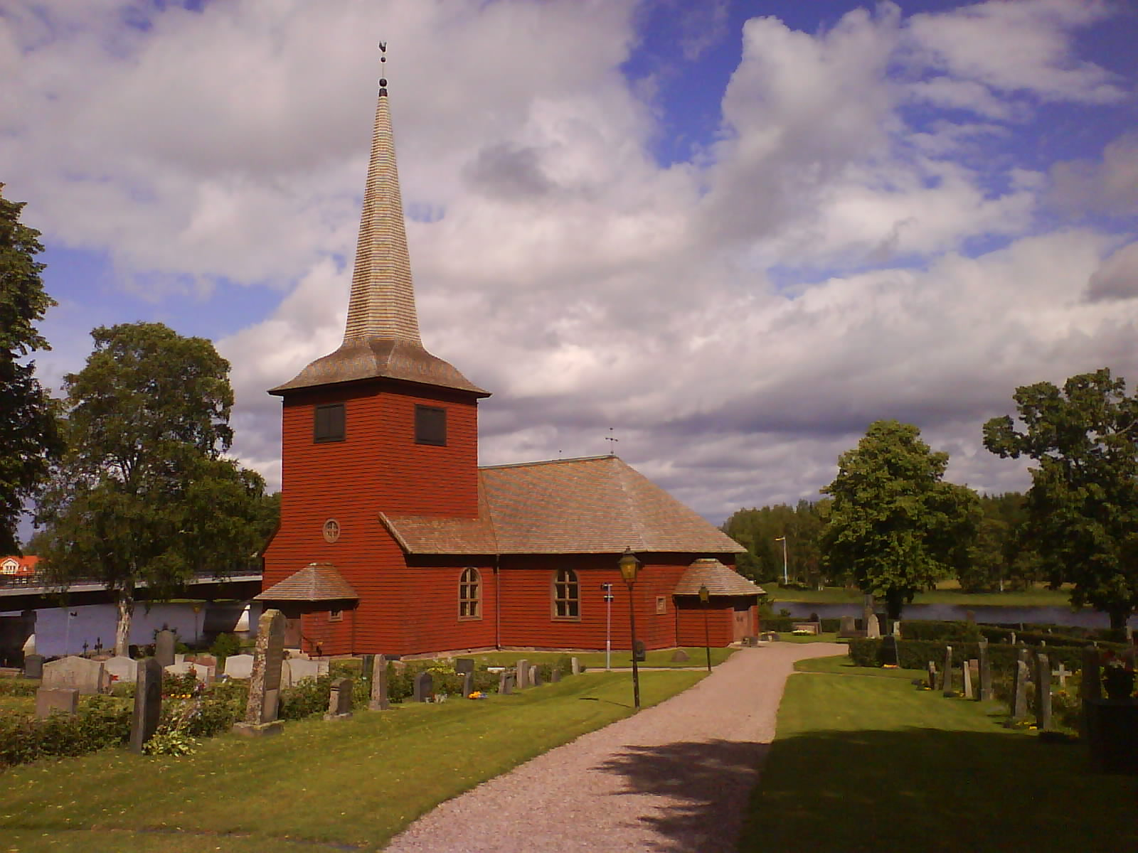 Bild av Lungsunds kyrka